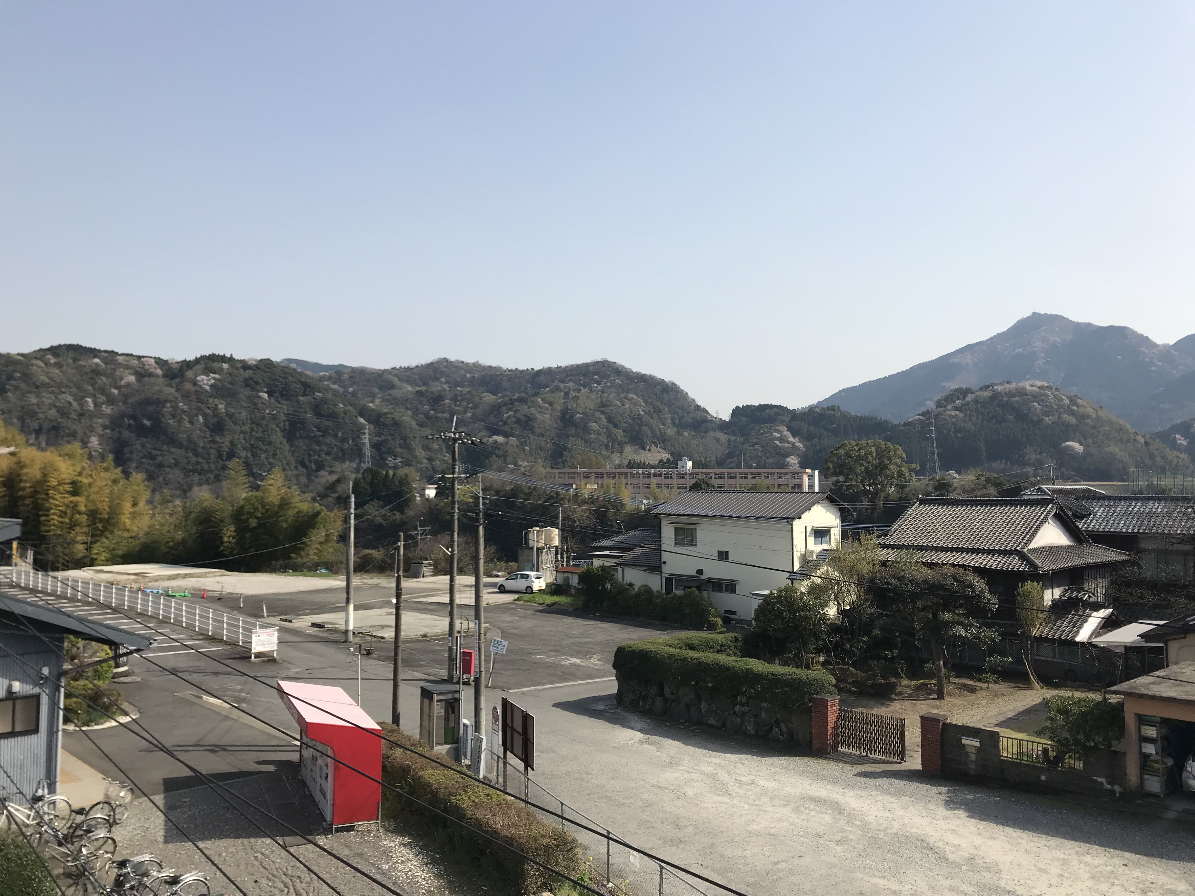 小野屋駅の跨線橋より望む駅前風景